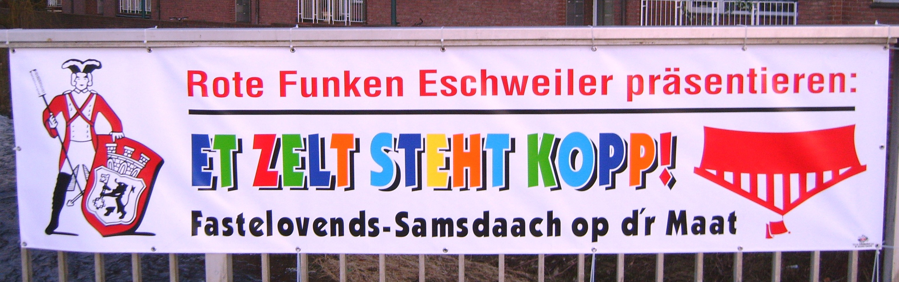 Transparent zu einer Veranstaltung des Eschweiler Karnevals in Eischwiele Platt